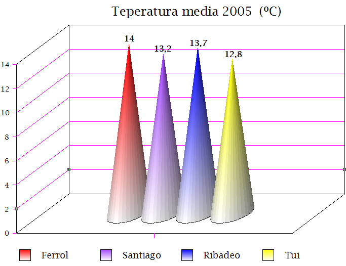 Temperatura media 2005 en Galiza (IGE)